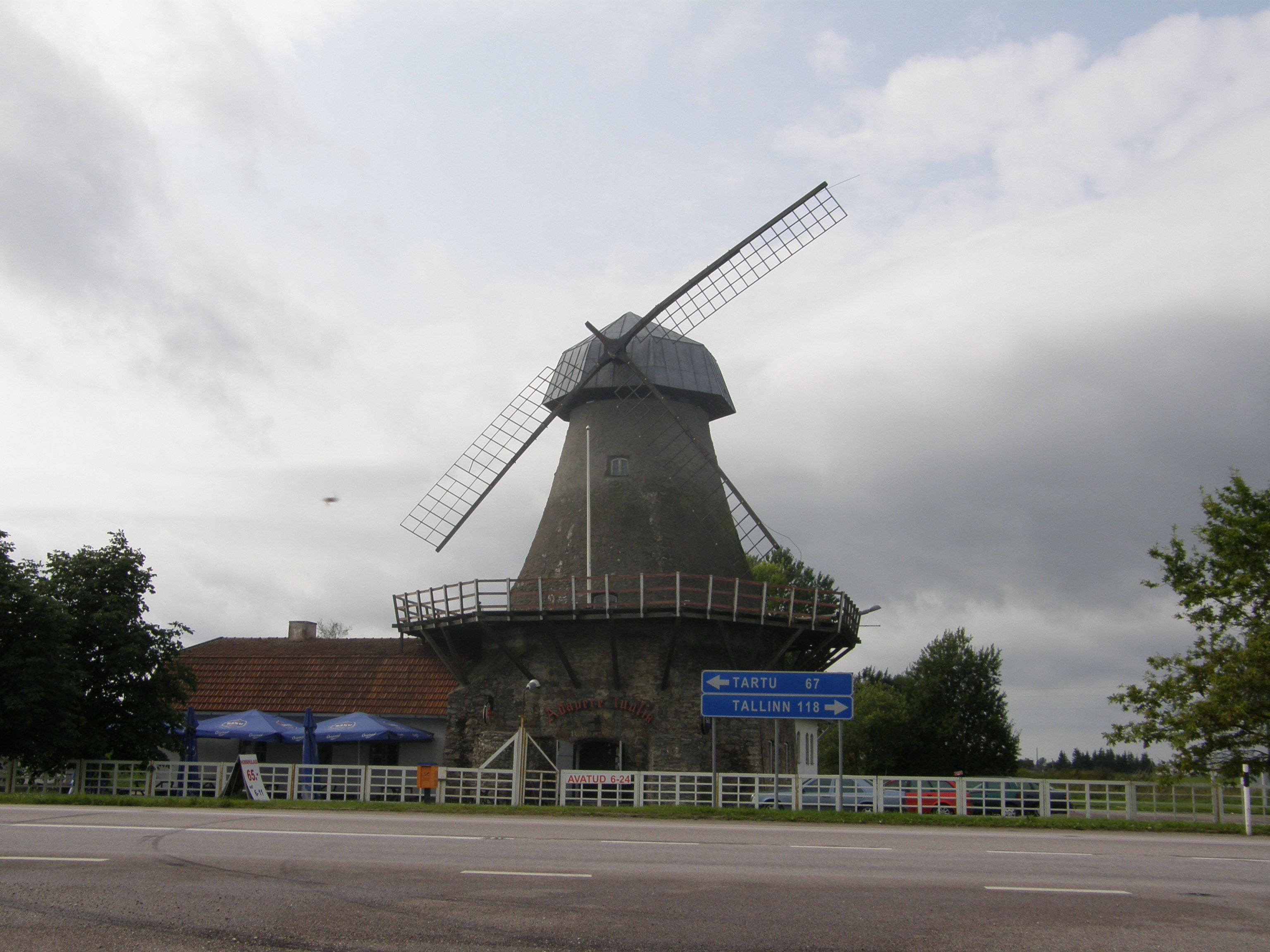 Adavere tuulik